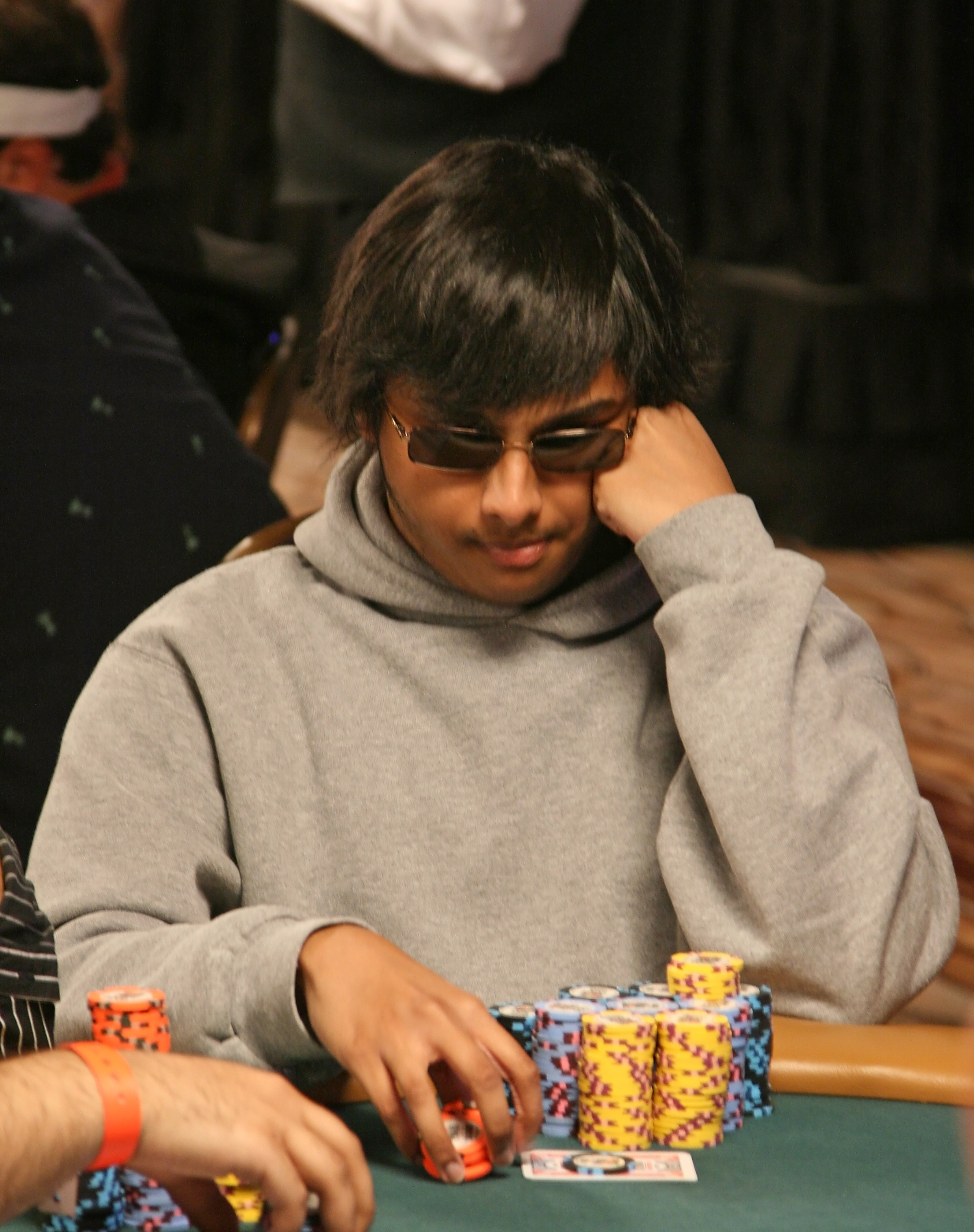 Vivek Rajkumar bei der World Series of Poker 2008